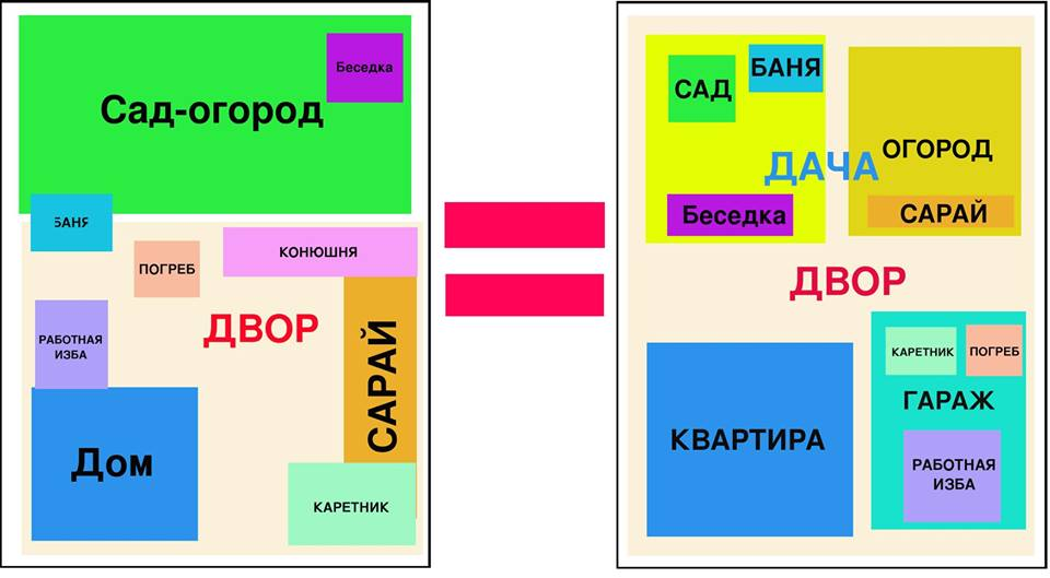 Элементы распределенного образа жизни сельского жителя и горожанина